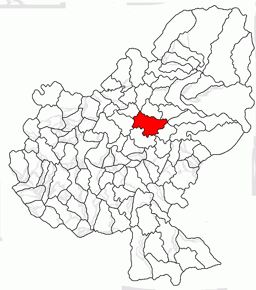 Categorie:Hărţi ale judeţului Mureş